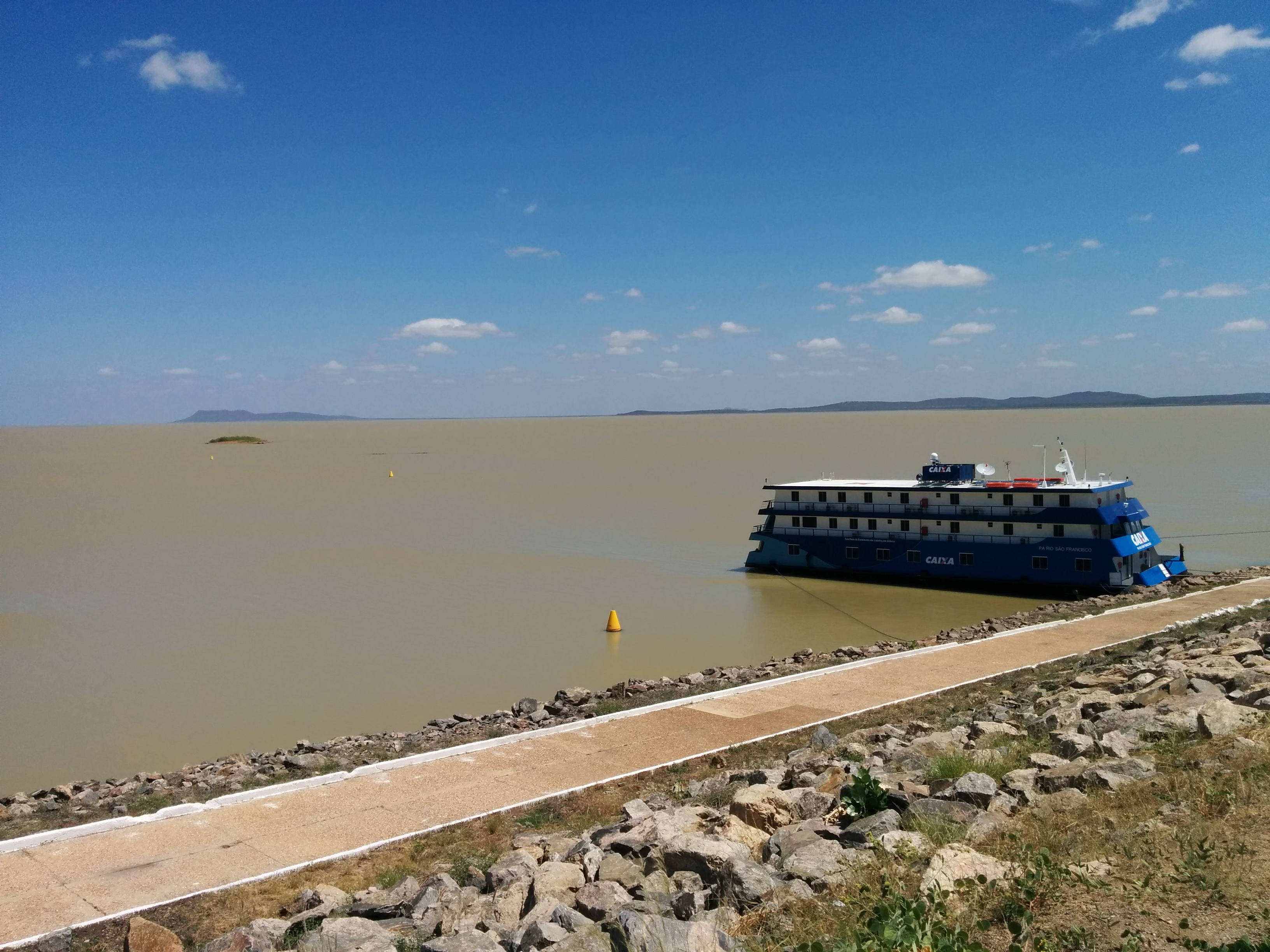 Barragem de Sobradinho Bahia